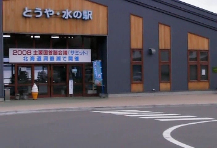 とうや水の駅を撮影した画像。